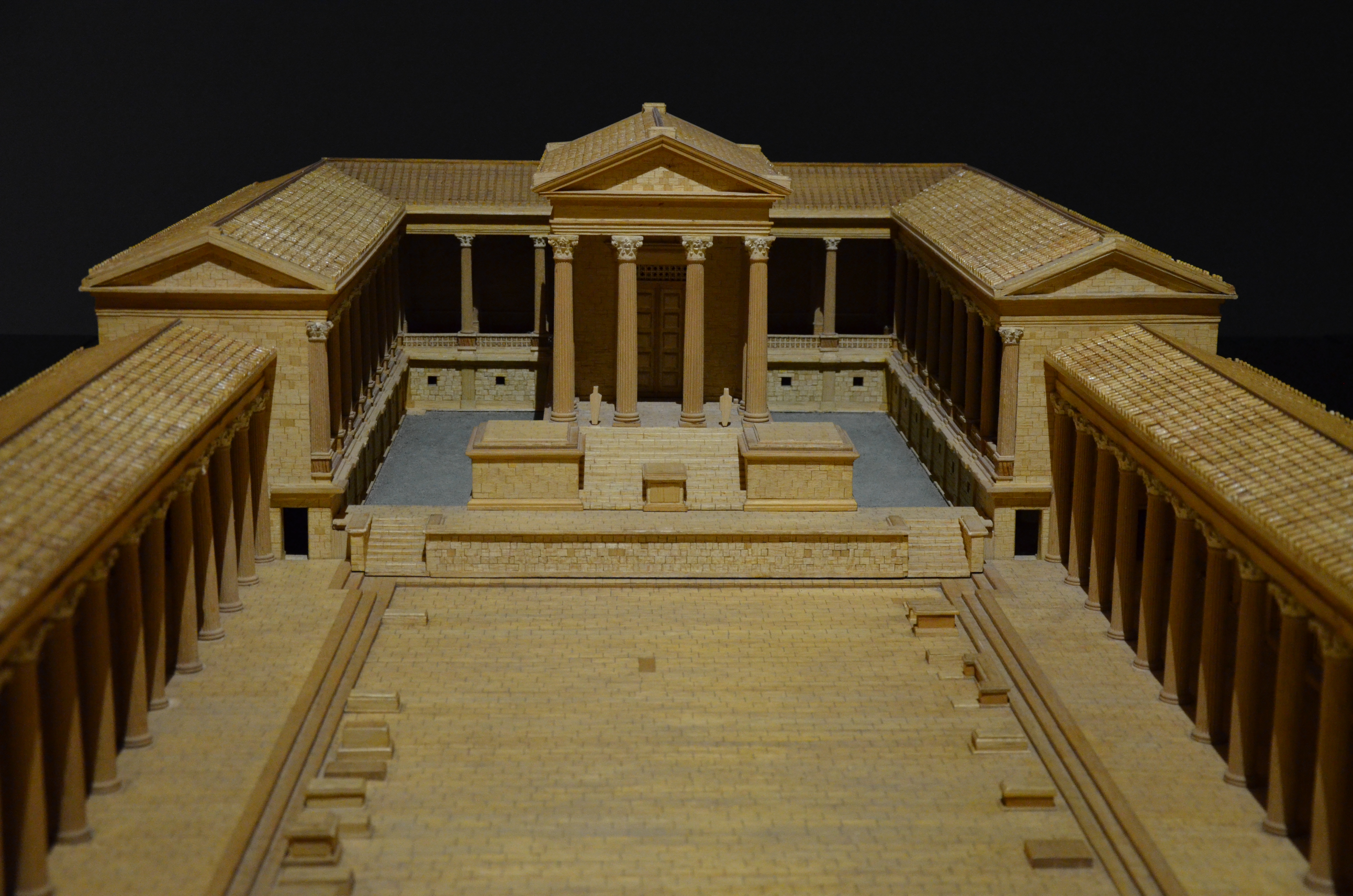 Conimbriga